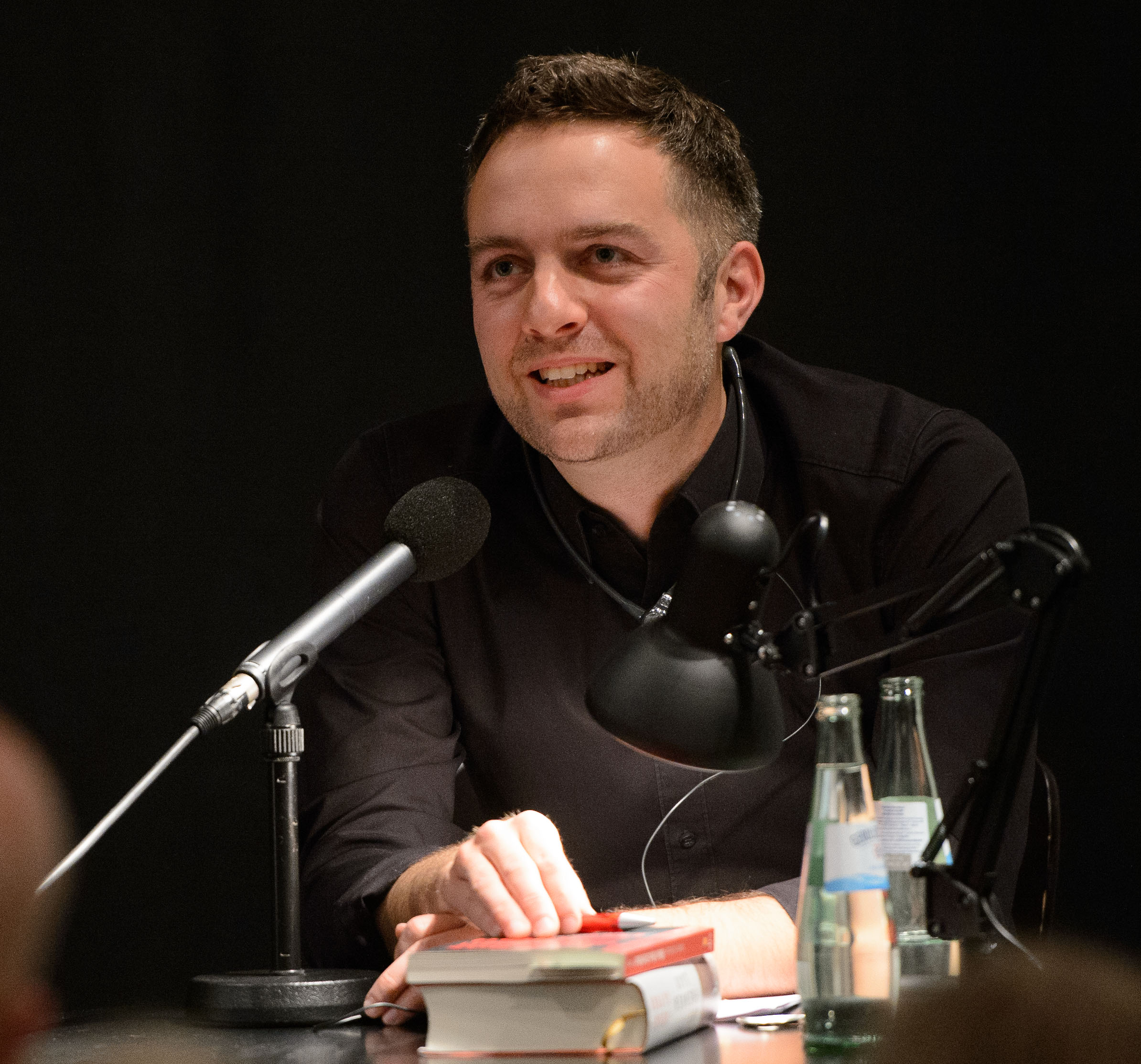 Martin Schäuble (Schriftsteller, Deutschland), Foto